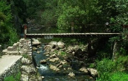 Cheile Turzii, Puntea II